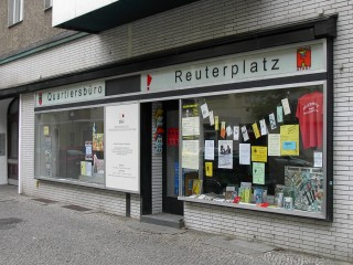 Quartiersbüro des Quartiersmanagement Reuterplatz im Berliner Stadtteil Neukölln